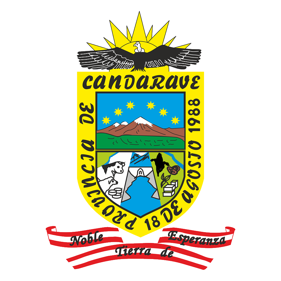 Candarave, Tacna, Perú